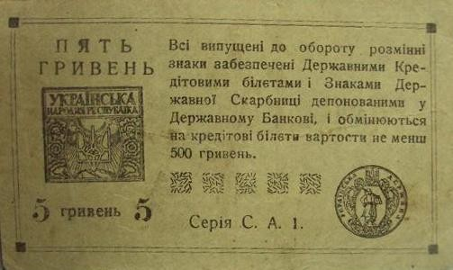 Реверс 5 гривні Директорії УНР